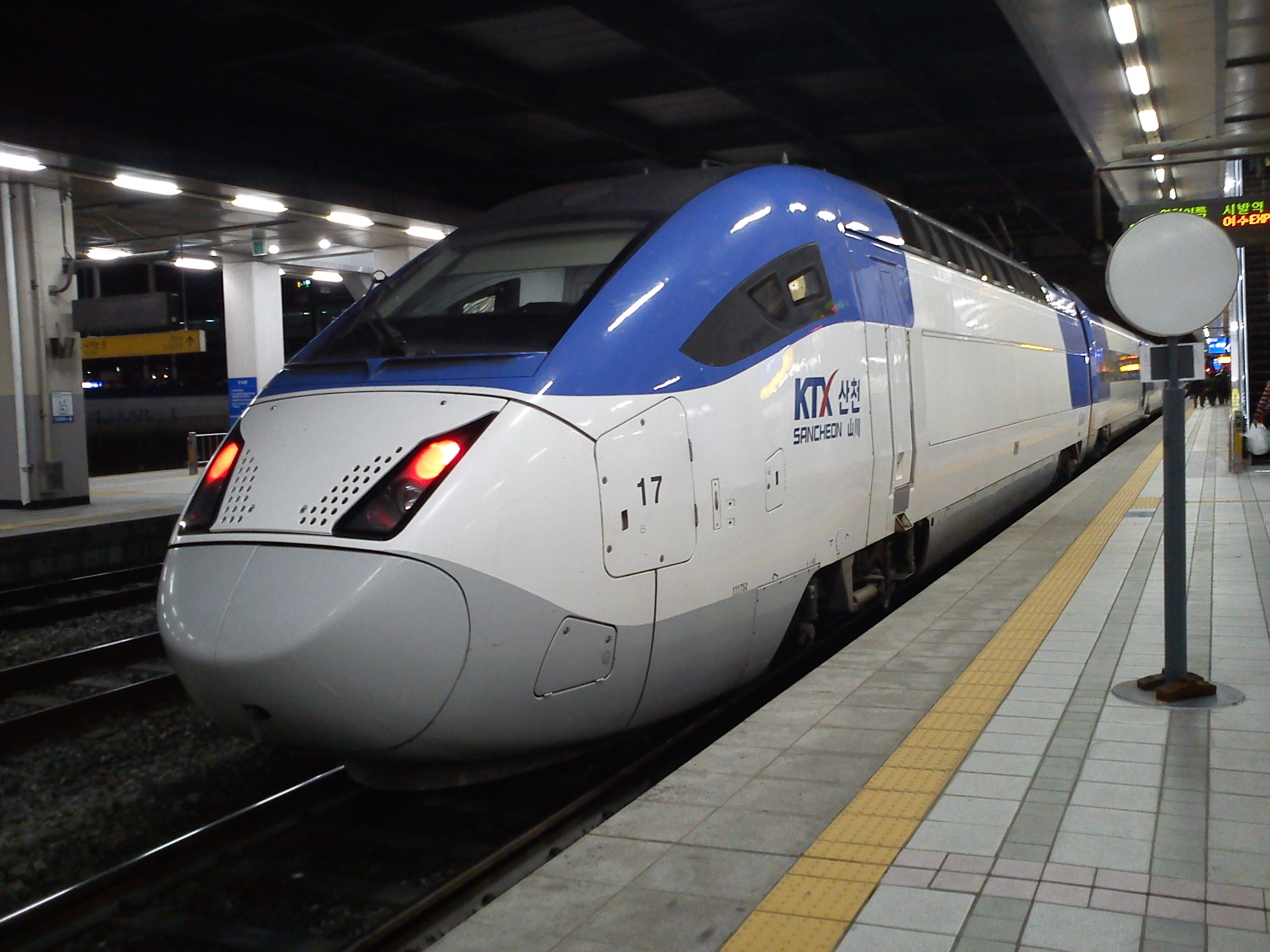 KTX山川 龍山駅にて